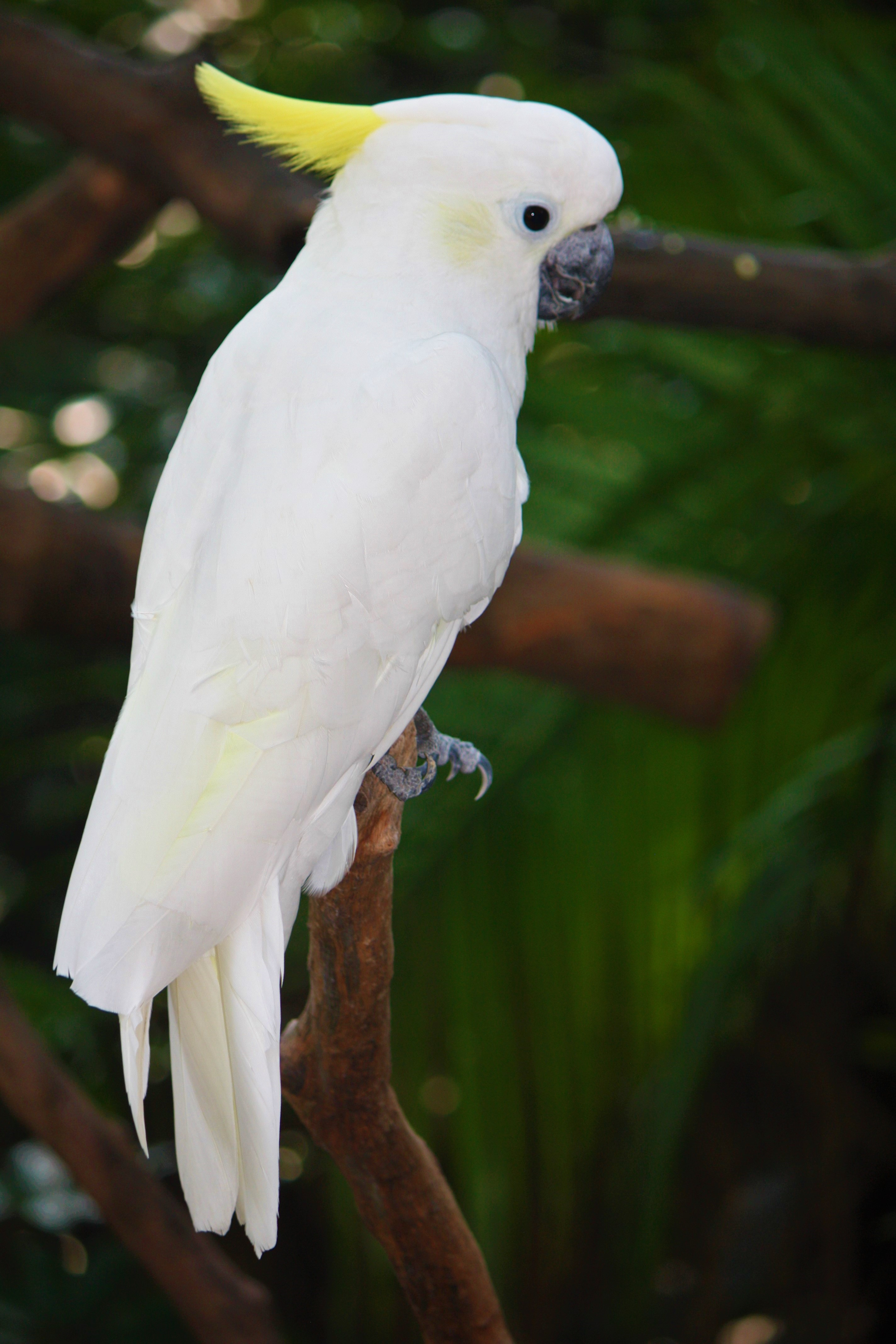 Zoo Guangzhou